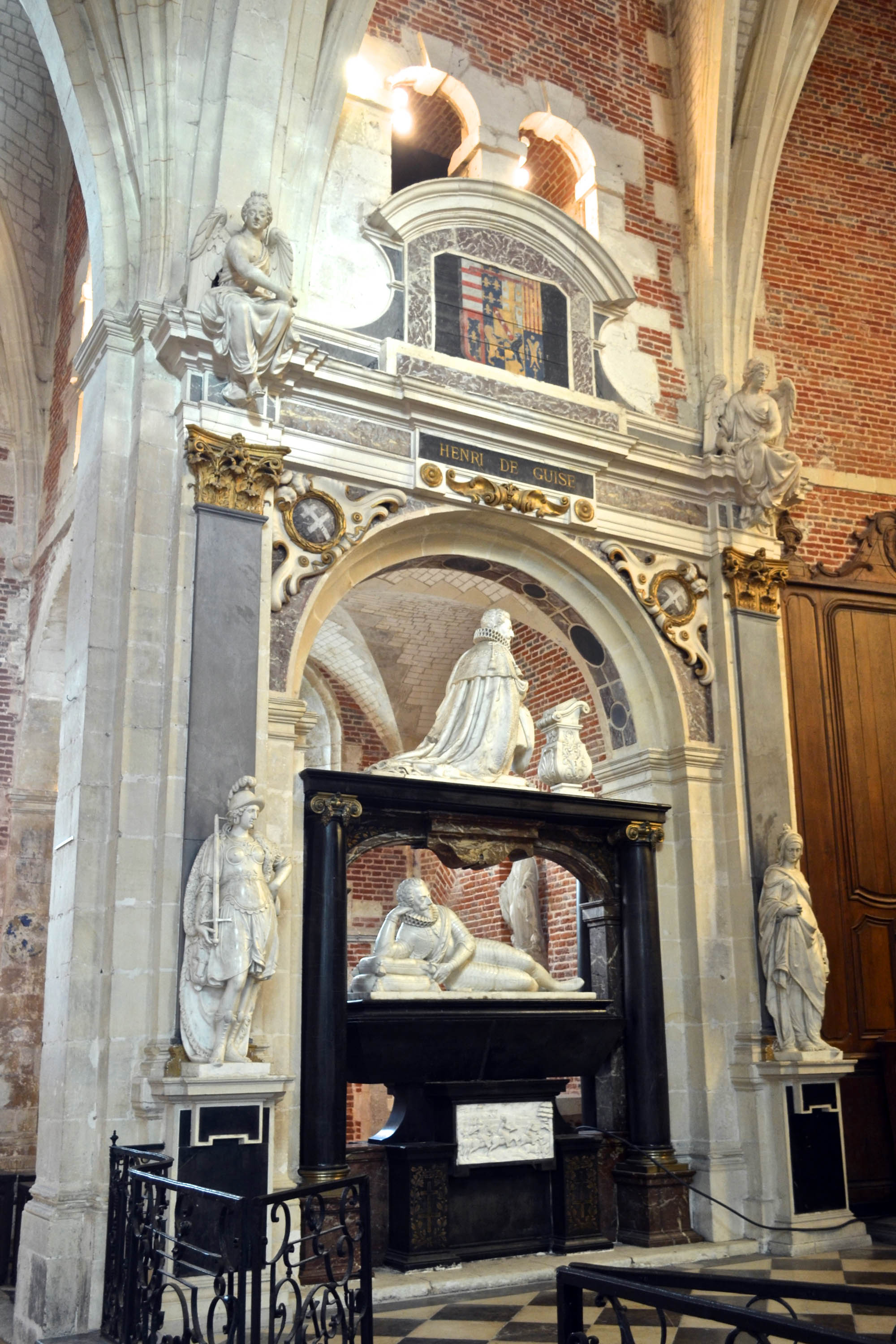 Chapelle du collège des Jésuites d'Eu (Seine-Maritime, France), mausolée d'Henri de Guise.